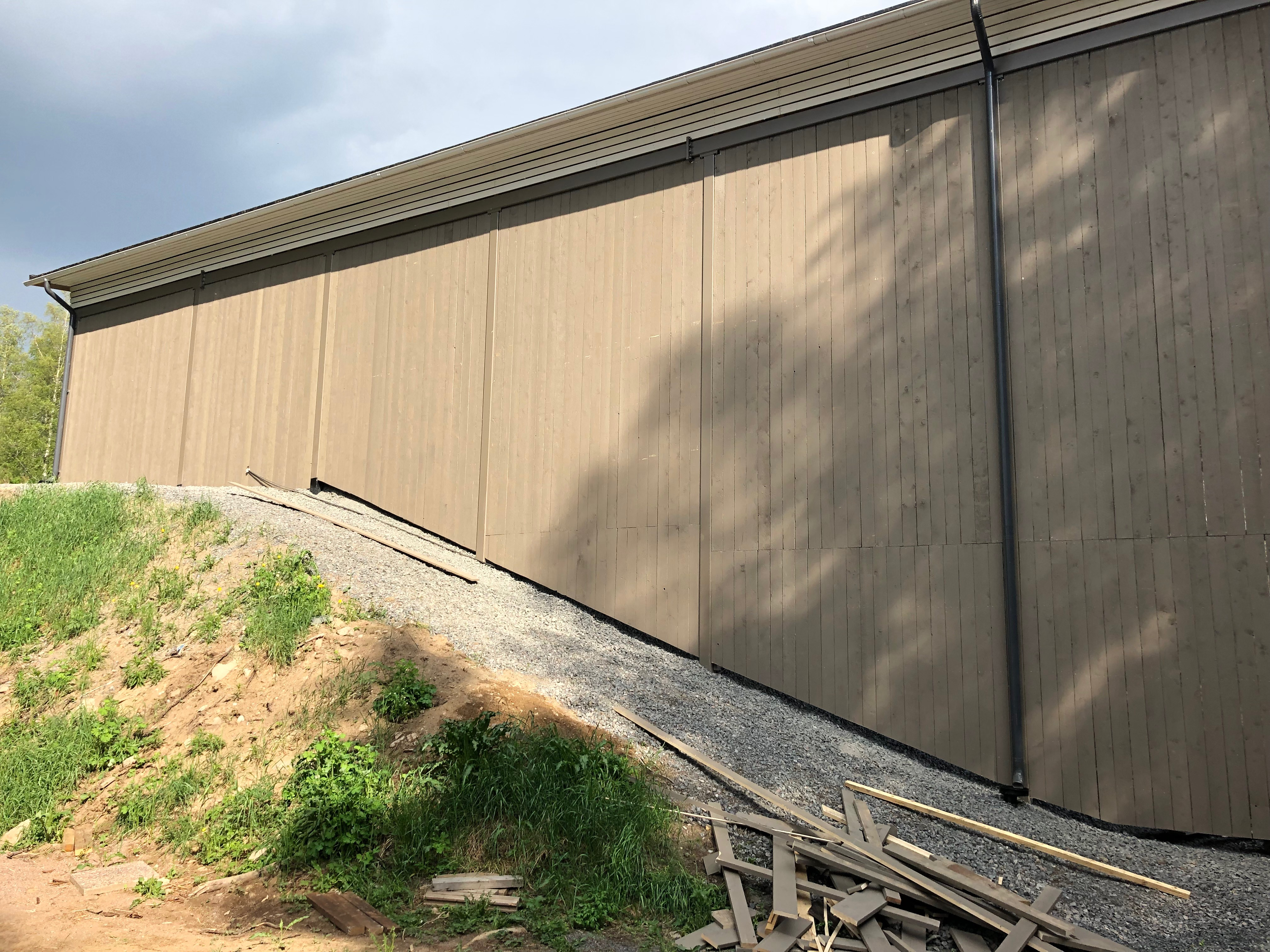 Ypäjän Musiikkiteatteri katsomon kiinteä katto ja sivuseinää keväällä 2019